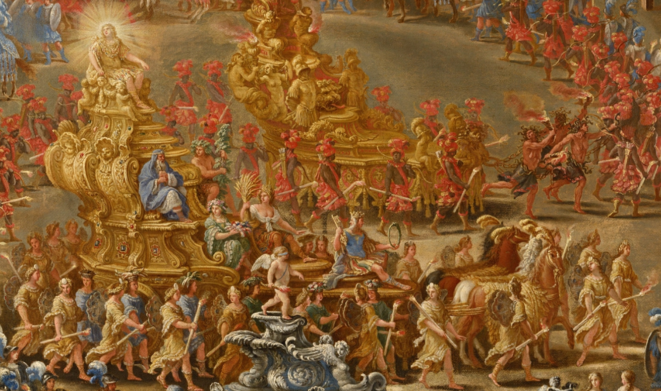 Carro di Apollo - Dettaglio del dipinto La Giostra dei Caroselli, opera che raffigura la sfarzosa parata allegorica organizzata a Palazzo Barberini, durante il carnevale del 1656, in onore di Cristina di Svezia da poco giunta a Roma dopo l'abdicazione dal trono svedese